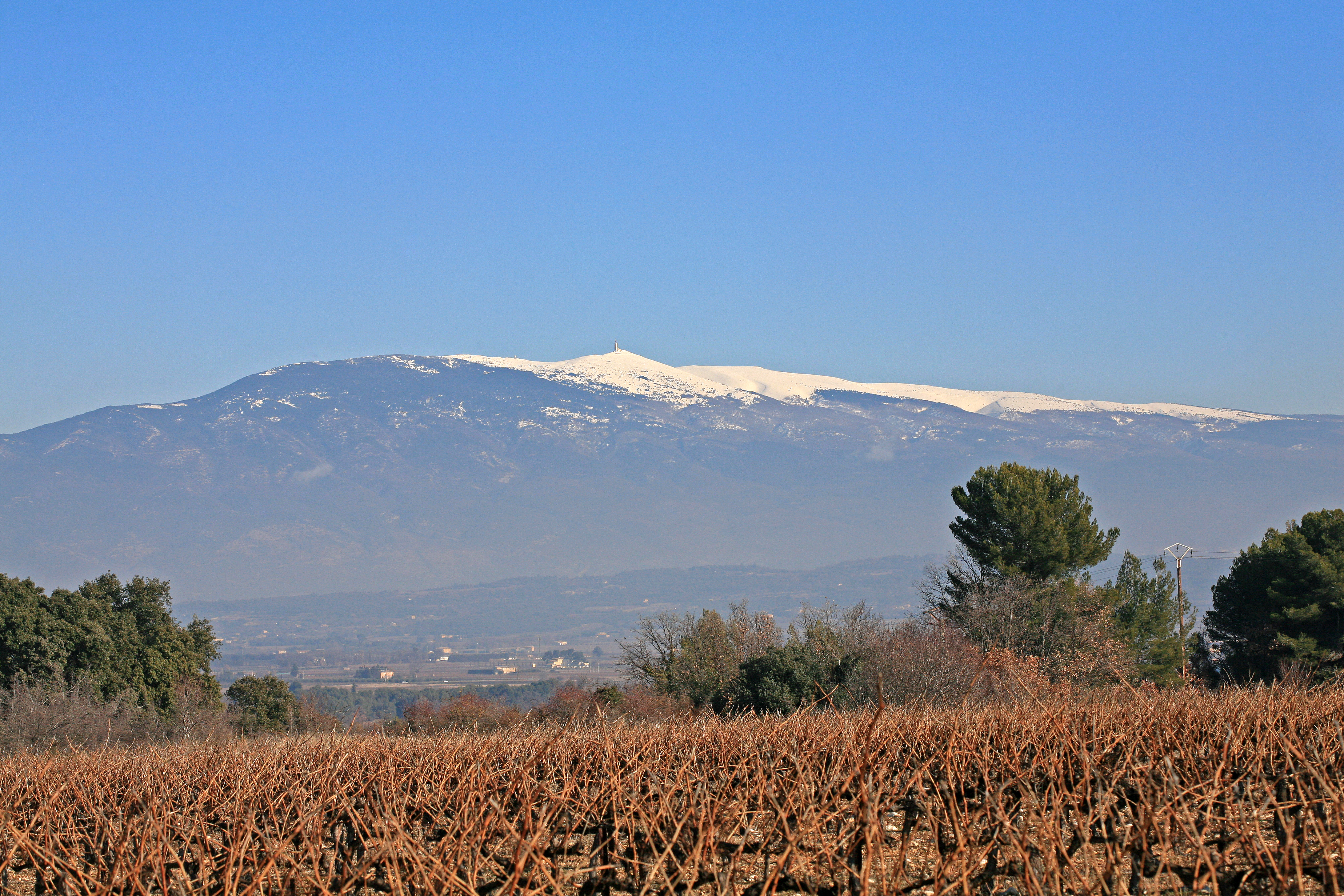 Le Mont Ventoux, France